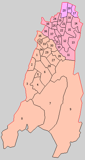 富山県東礪波郡の町村。